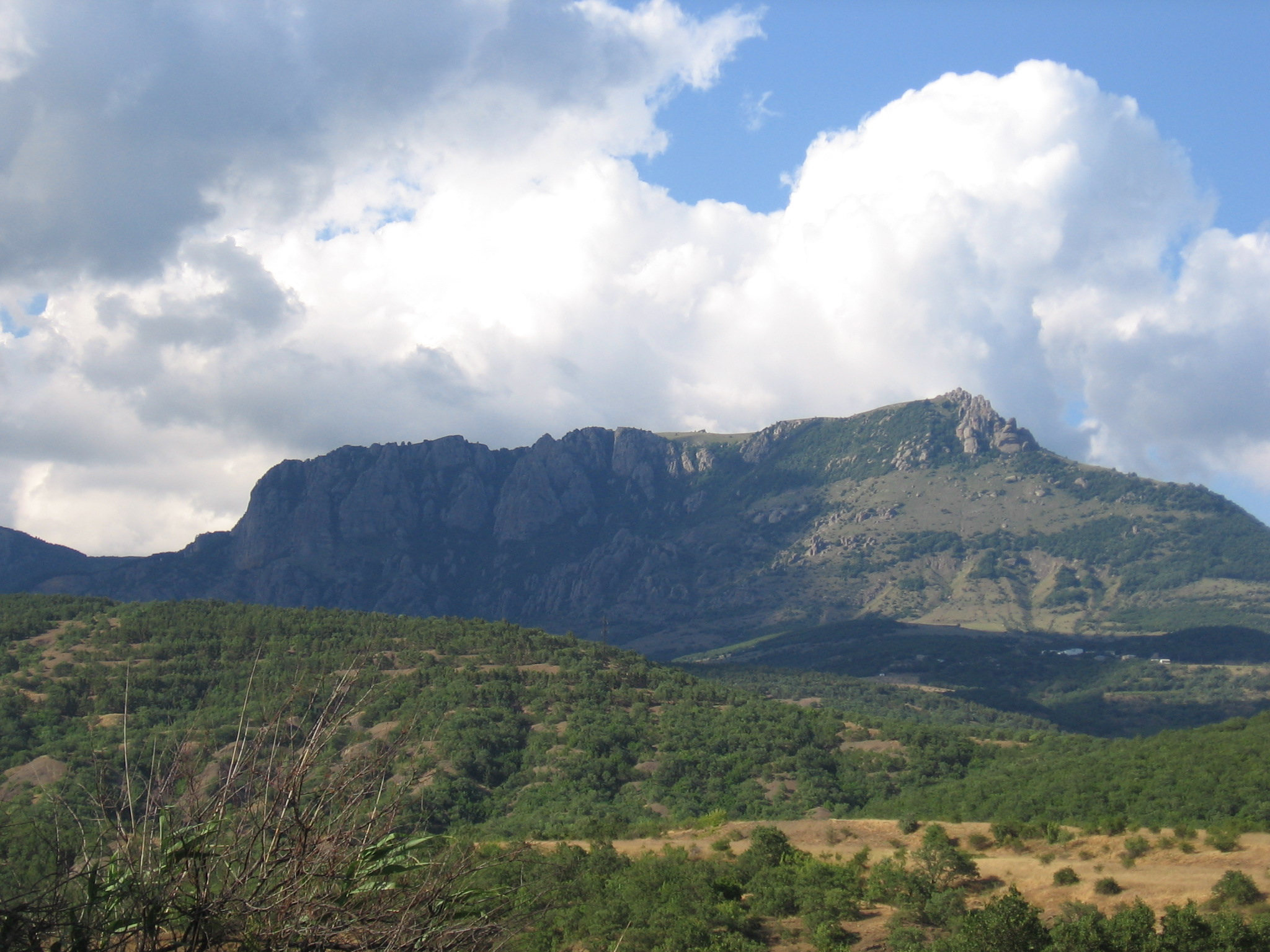 гора Южная Демерджи, вид с юго-запада